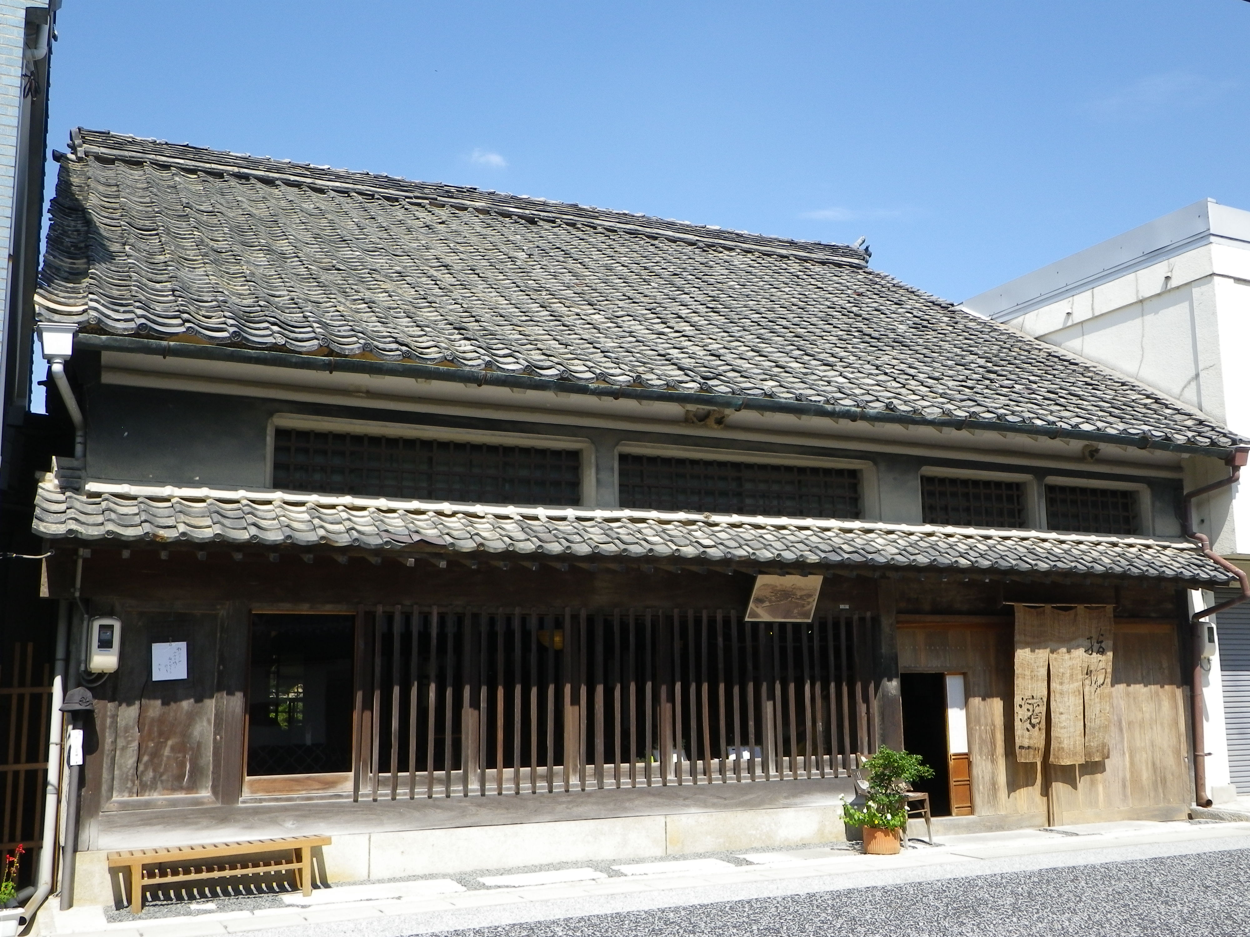 広島県府中市上下町、旧田辺邸（江戸時代に掛屋を営んでいた。）